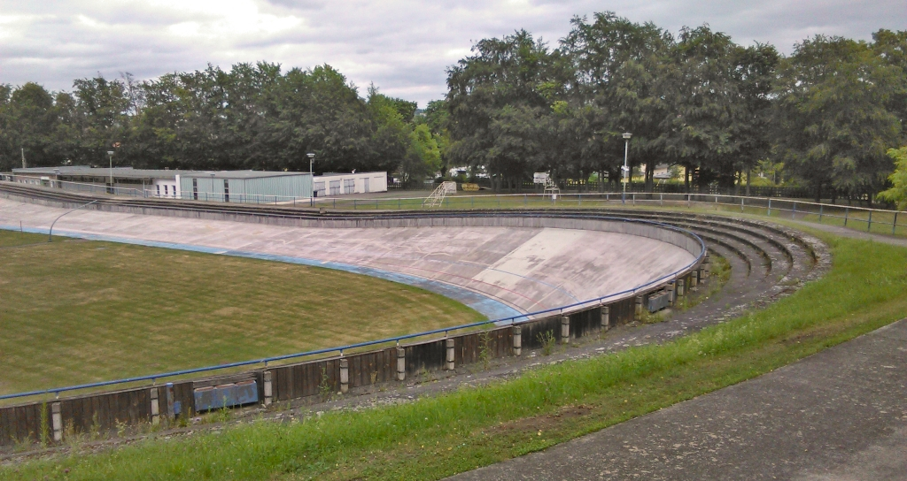 Radrennbahn in Gera-Debschwitz, Ostkurve. Im Hintergrund die Funktionsgebäude. Jahr 2020.